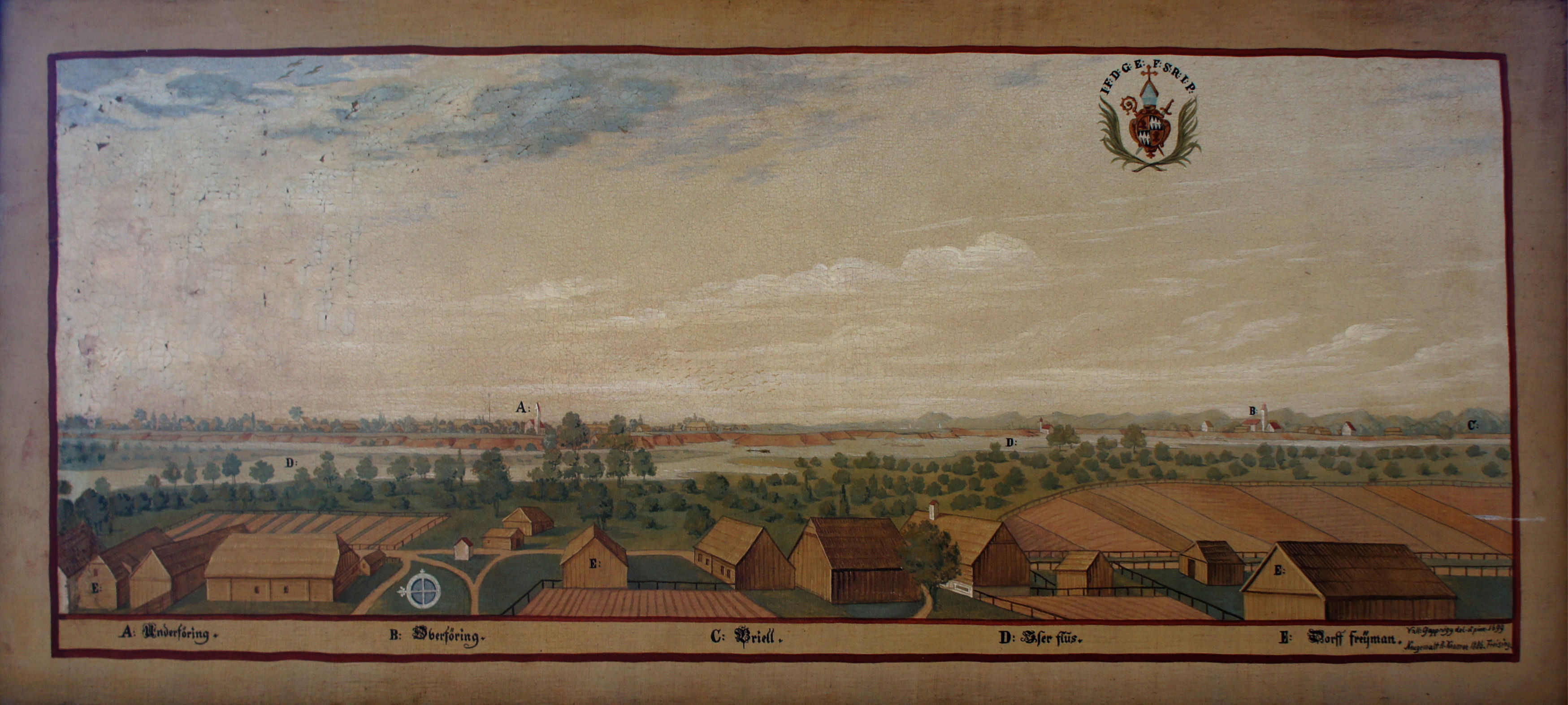 Gemälde aus einer Serie mit Darstellungen von Besitztümern des Hochstifts Freising im Fürstengang zwischen Fürstbischöflicher Residenz und Freisinger Dom.